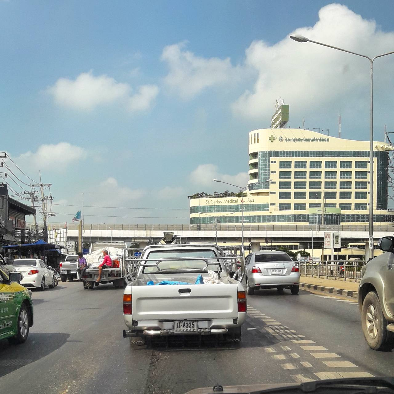 ทางหลวงแผ่นดินหมายเลข 346 บริเวณทางแยกบ้านกลาง